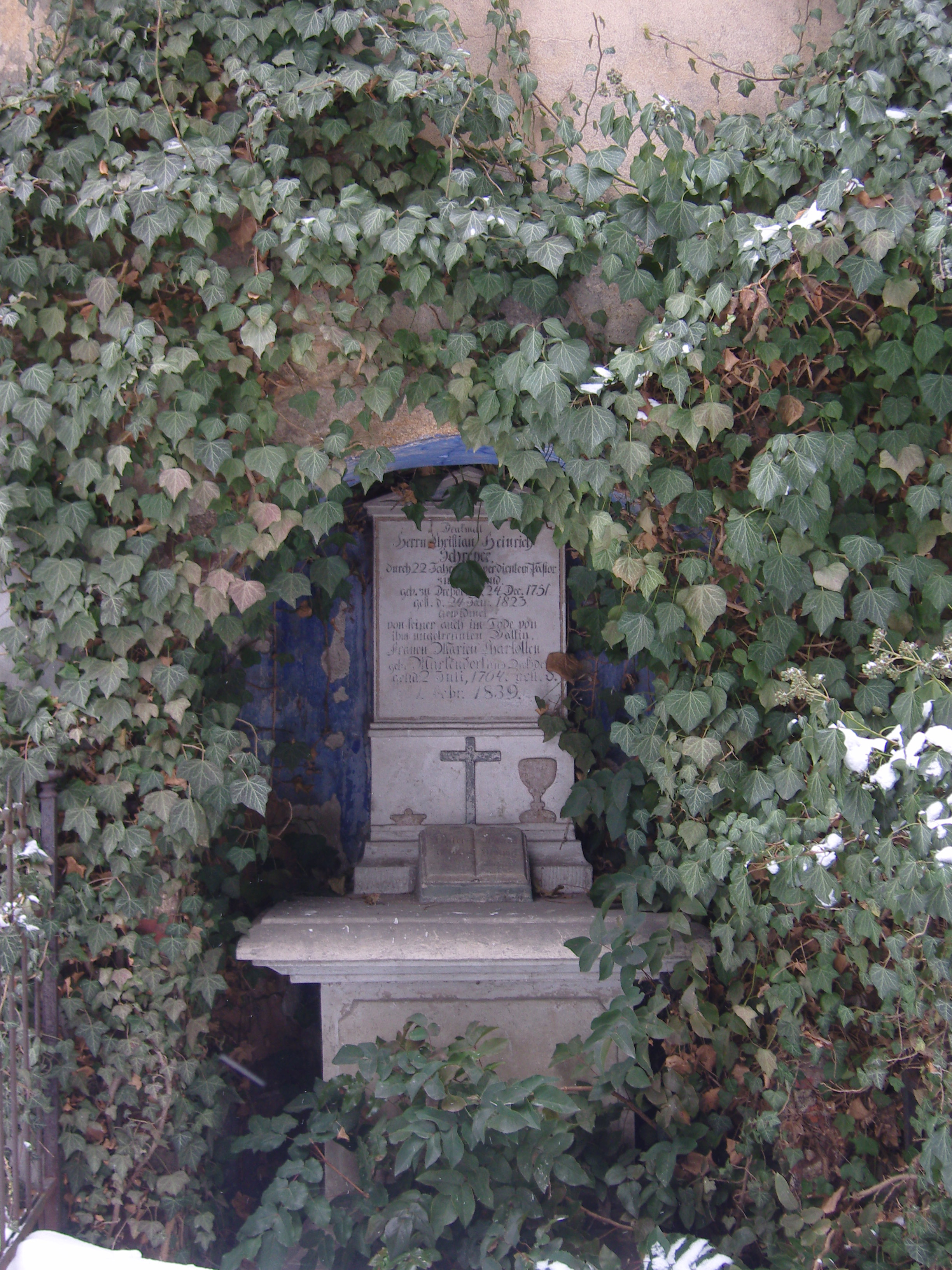 Grab für den Theologen und Heimatforscher Christian Heinrich Schreyer an der Jacobikirche in Ortrand